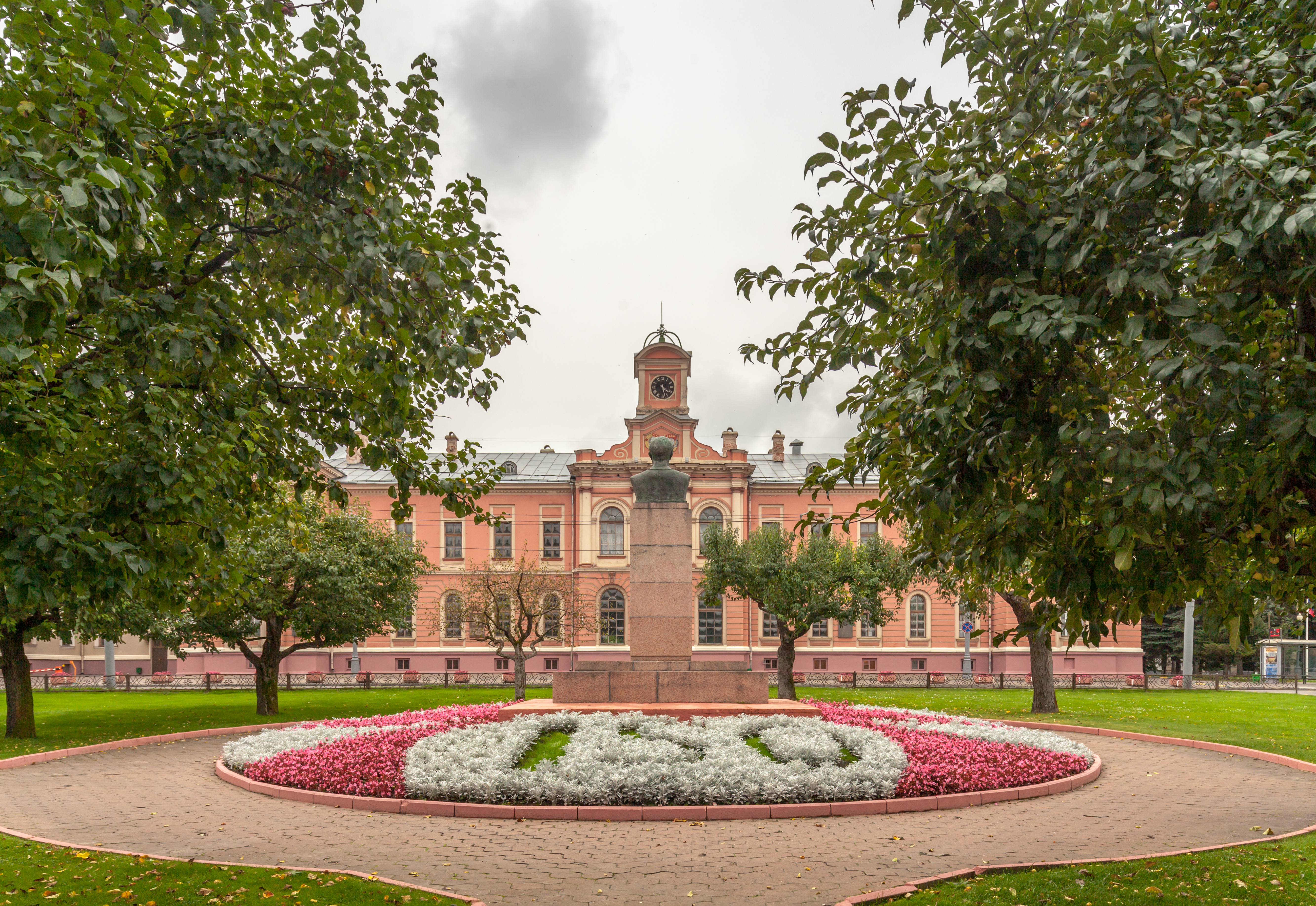 Усадьба Петровское-Разумовское (Ректорат РГАУ-МСХА им. К.А. Тимирязева). Клумба к 150-летию академии.